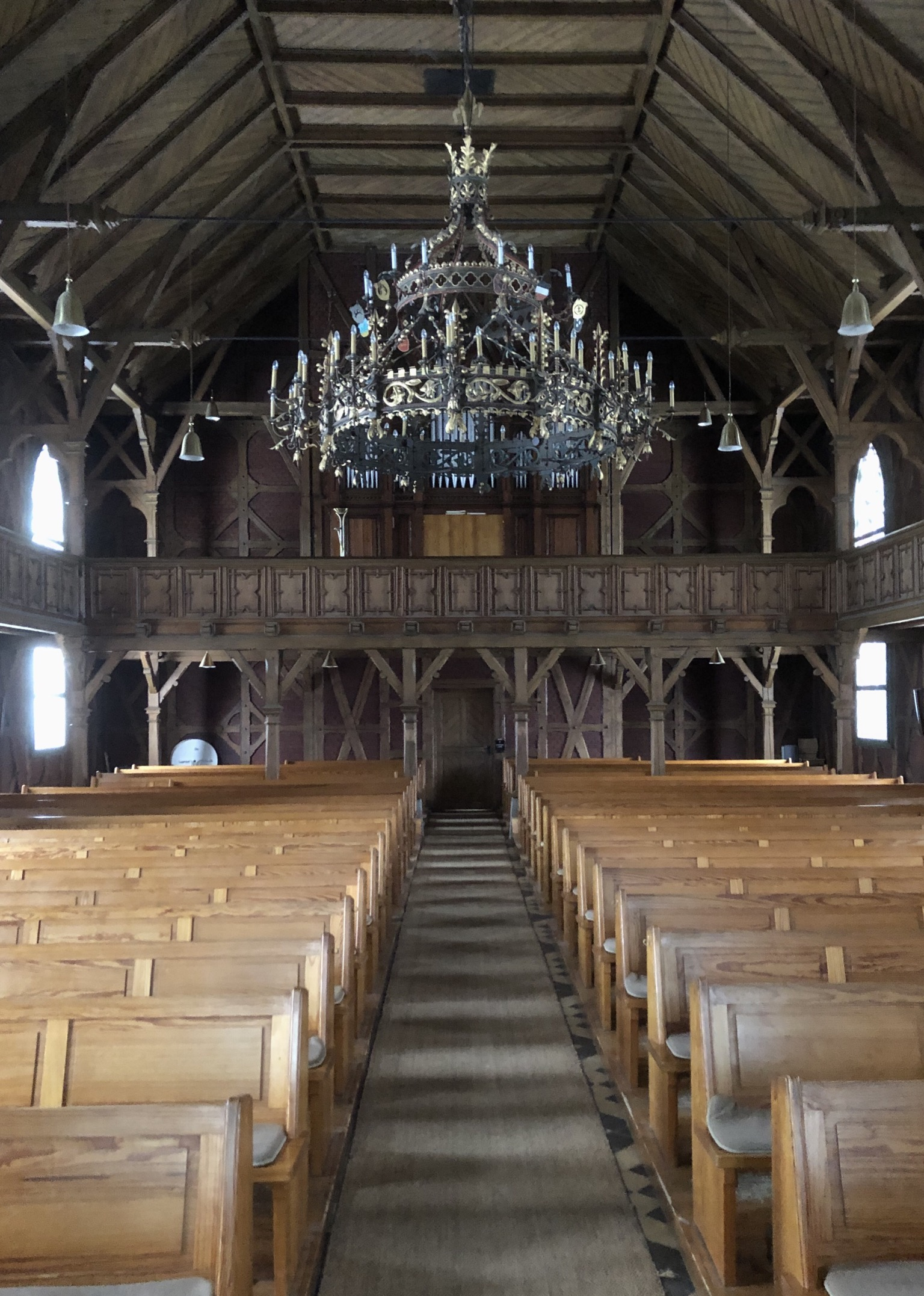 Kirchenschiff Trinitatiskirche Braunlage